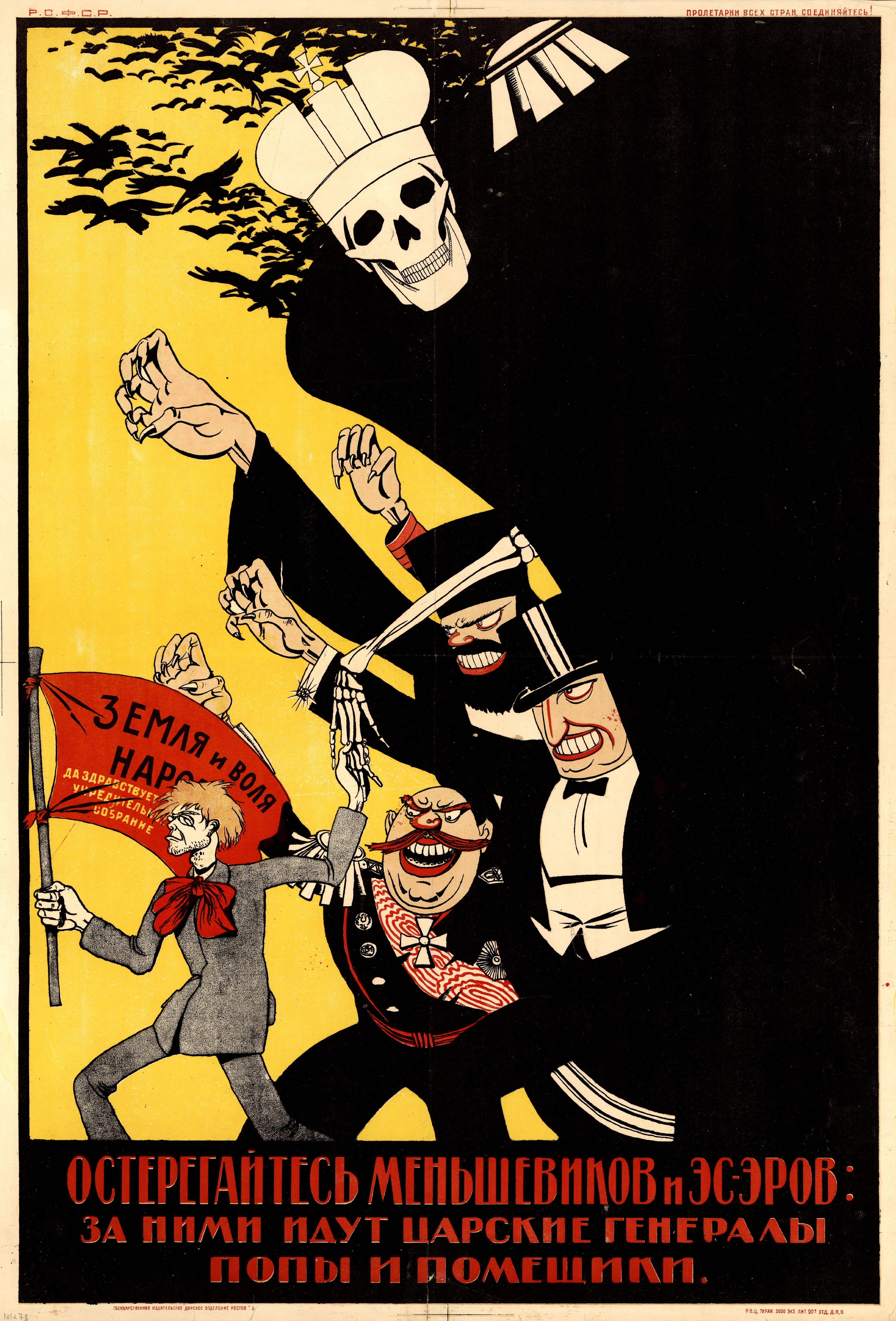 Плакат «Остерегайтесь меньшевиков и эс-эров: за ними идут царские генералы, попы и помещики». Ростов-на-Дону : Государственное издательство, [1920] (Ростов-на-Дону : 20-я литография отд. ДПО). Цветная литография, 1 лист, 101×78 см, 5000 экз.